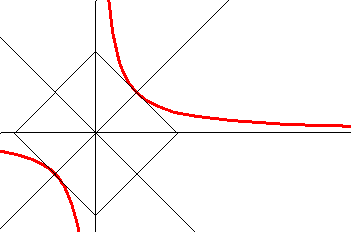 hyperbola eq.